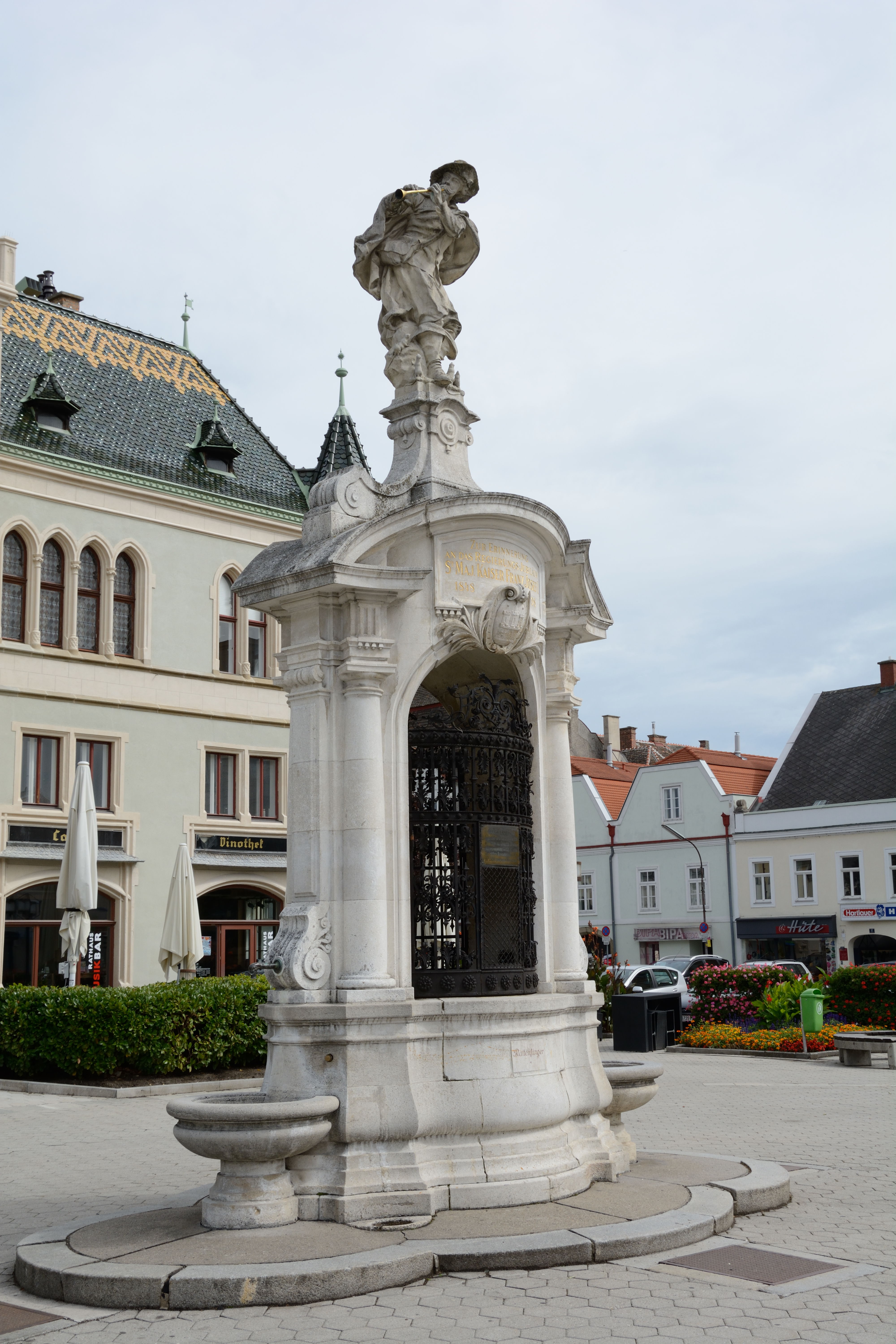 Rattenfängerbrunnen